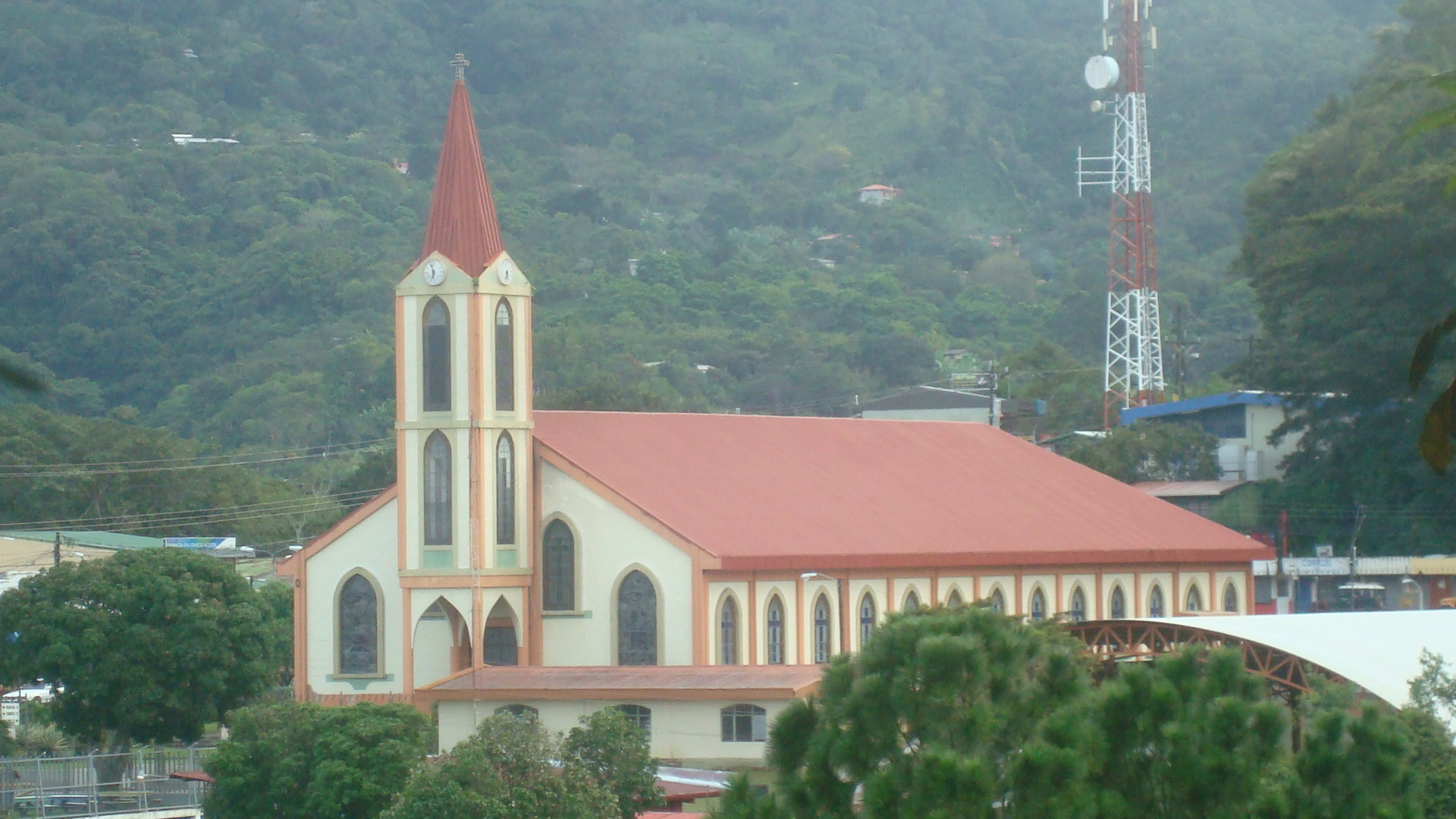 Iglesia de San Ignacio de Acosta, Costa Rica.